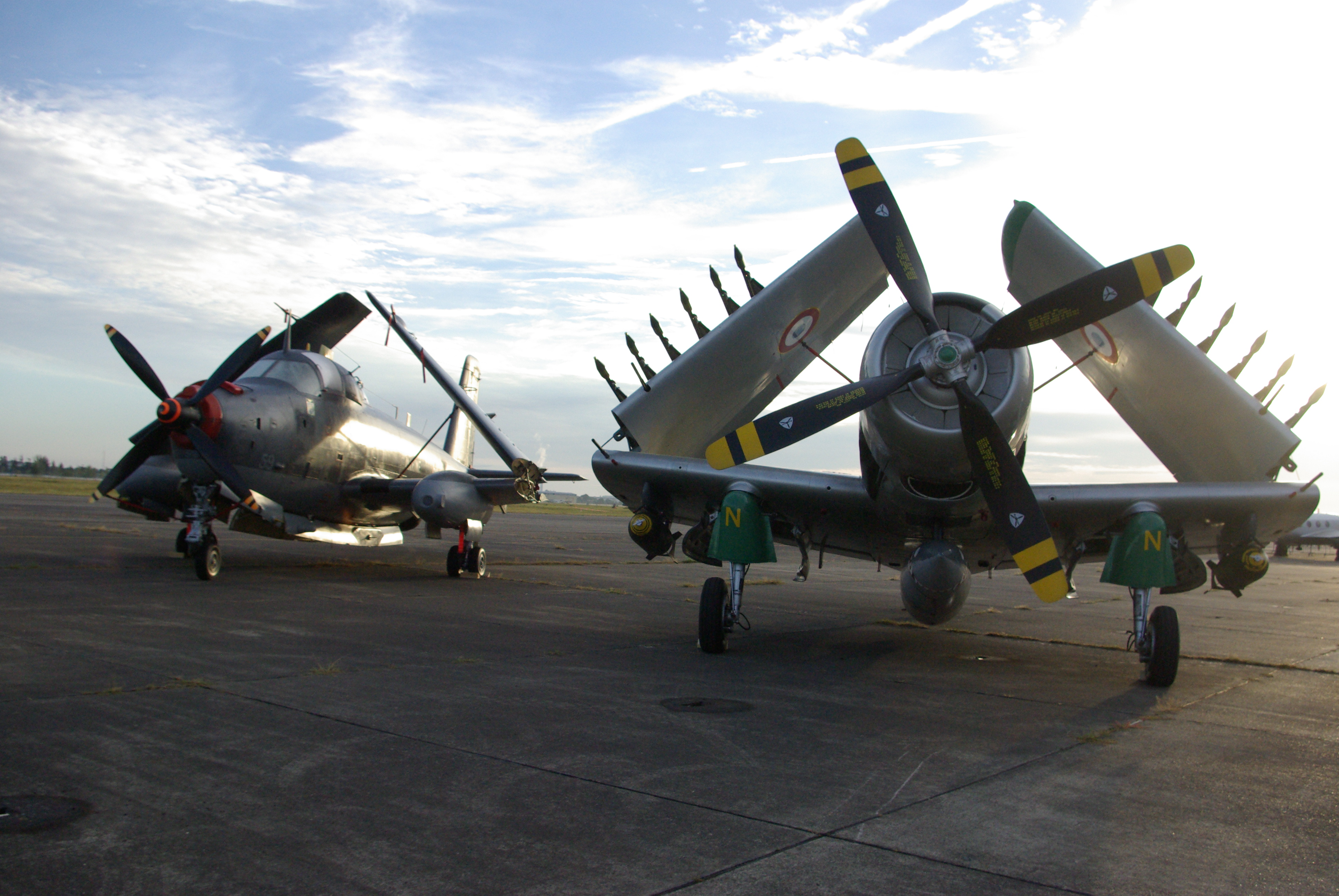 Br1050 Alizé F-AZYI et Skyraider F-AZHK au meeting Des Étoiles et des Ailes 2014 à Toulouse-Francazal.